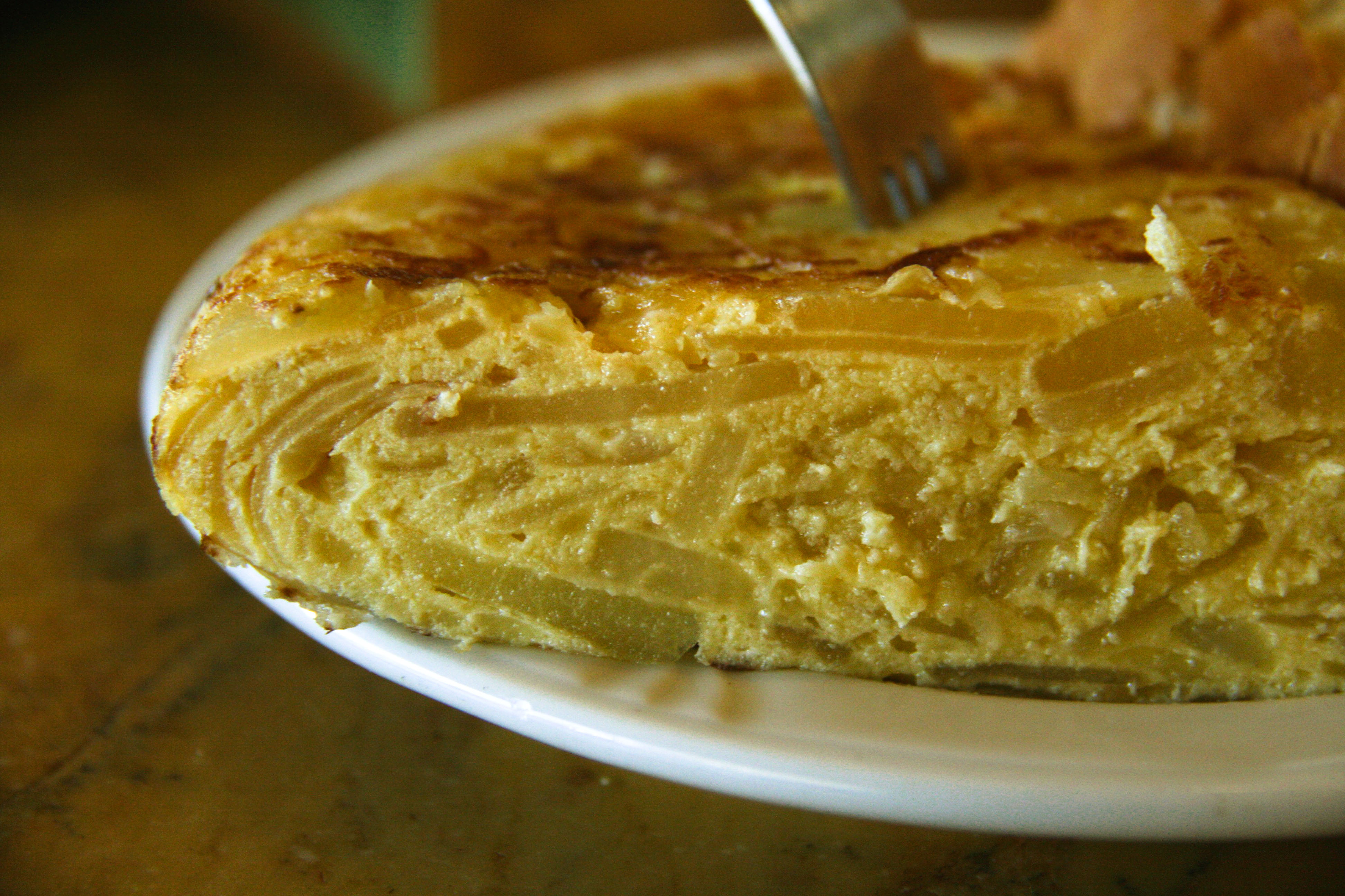 Corte transversal de una tortilla de patatas